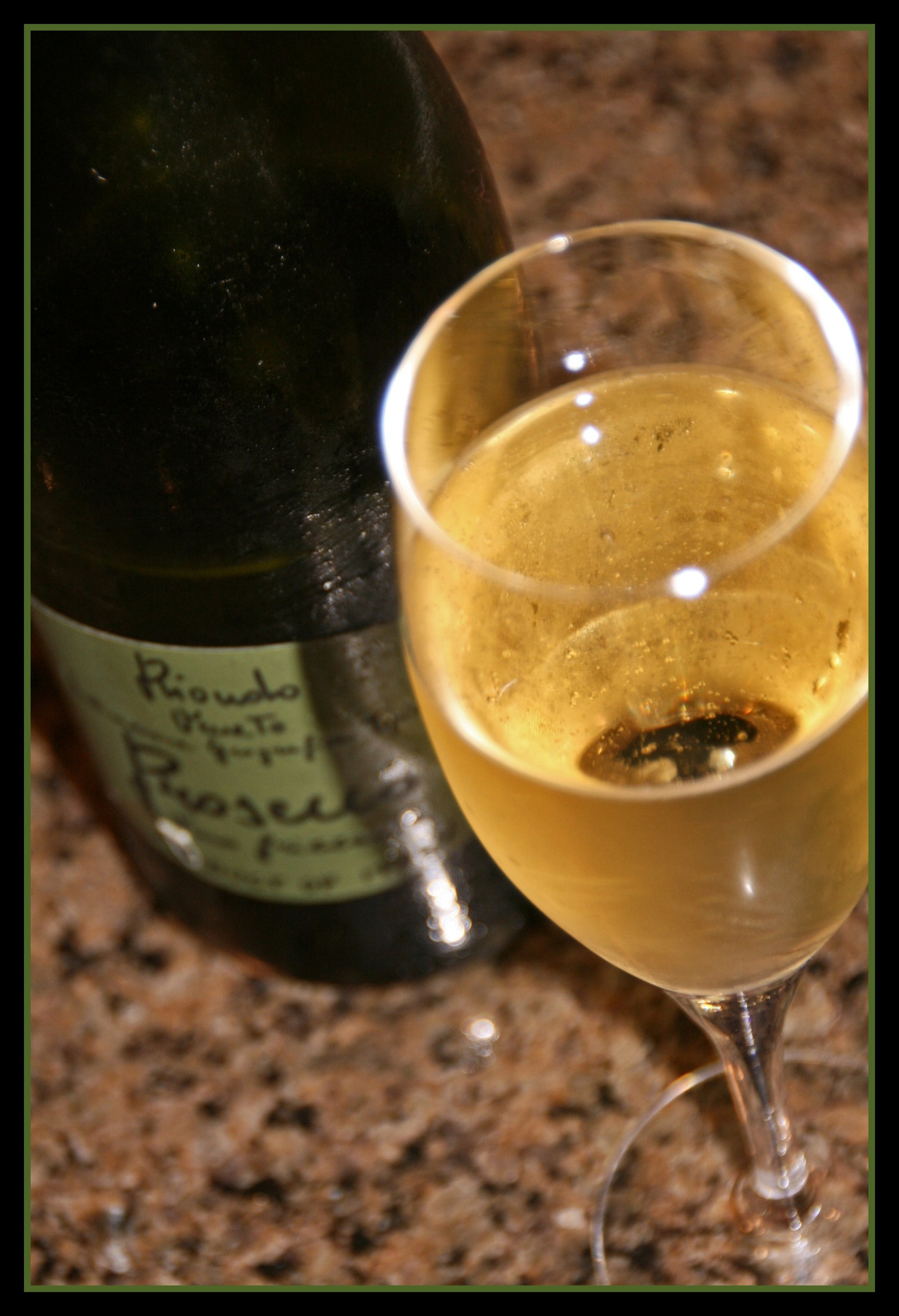 An Italian sparkling wine